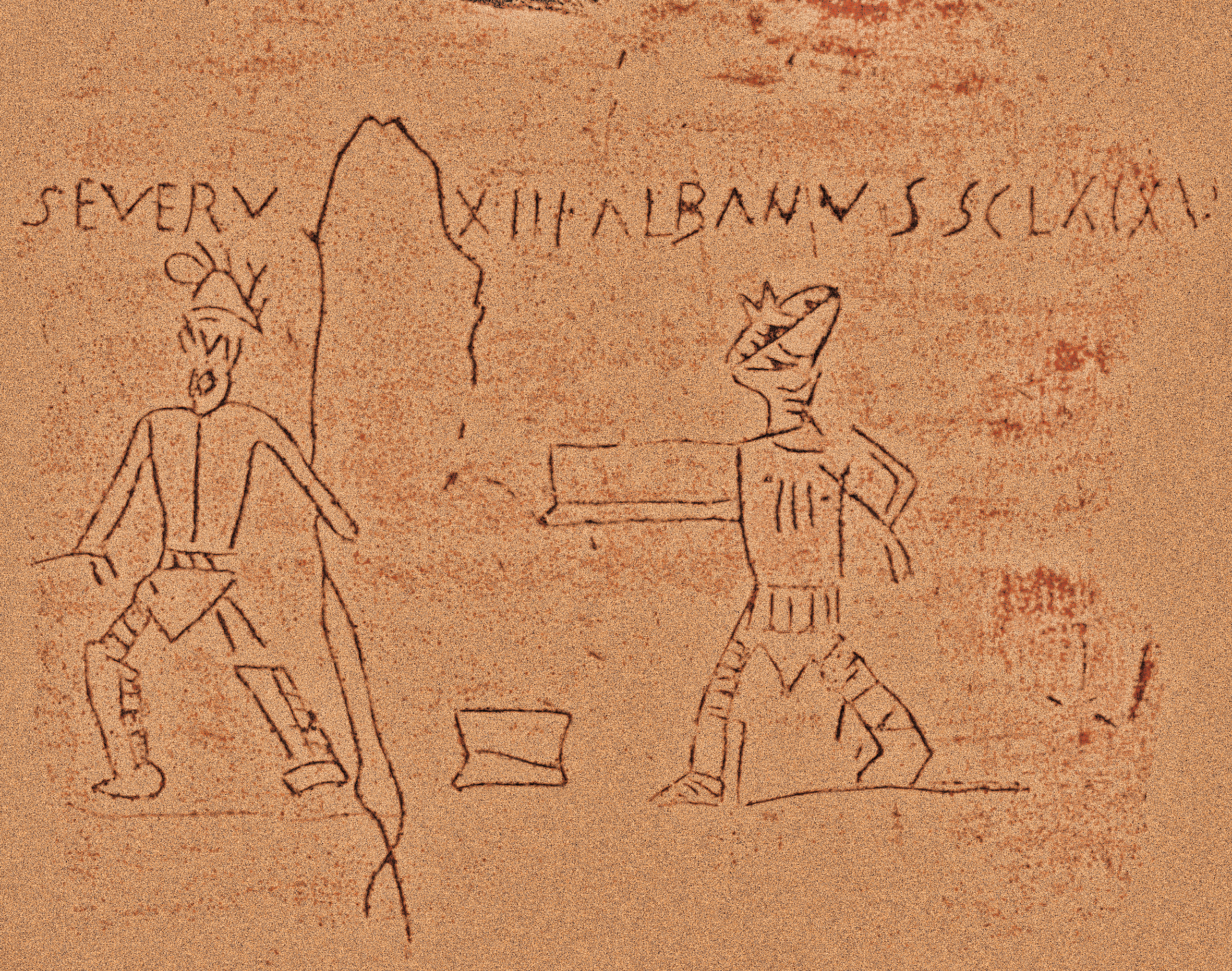 Ritzzeichnung zweier Gladiatoren nach einem mit vorliegenden Abguss. Fundort: Pompeji, Latium et Campania, Regio I. Text: Severus l(ibertus) XIII Albanus Sc(aeva) l(ibertus) XIX v(icit). Belegstelle: AE 1914, 00157